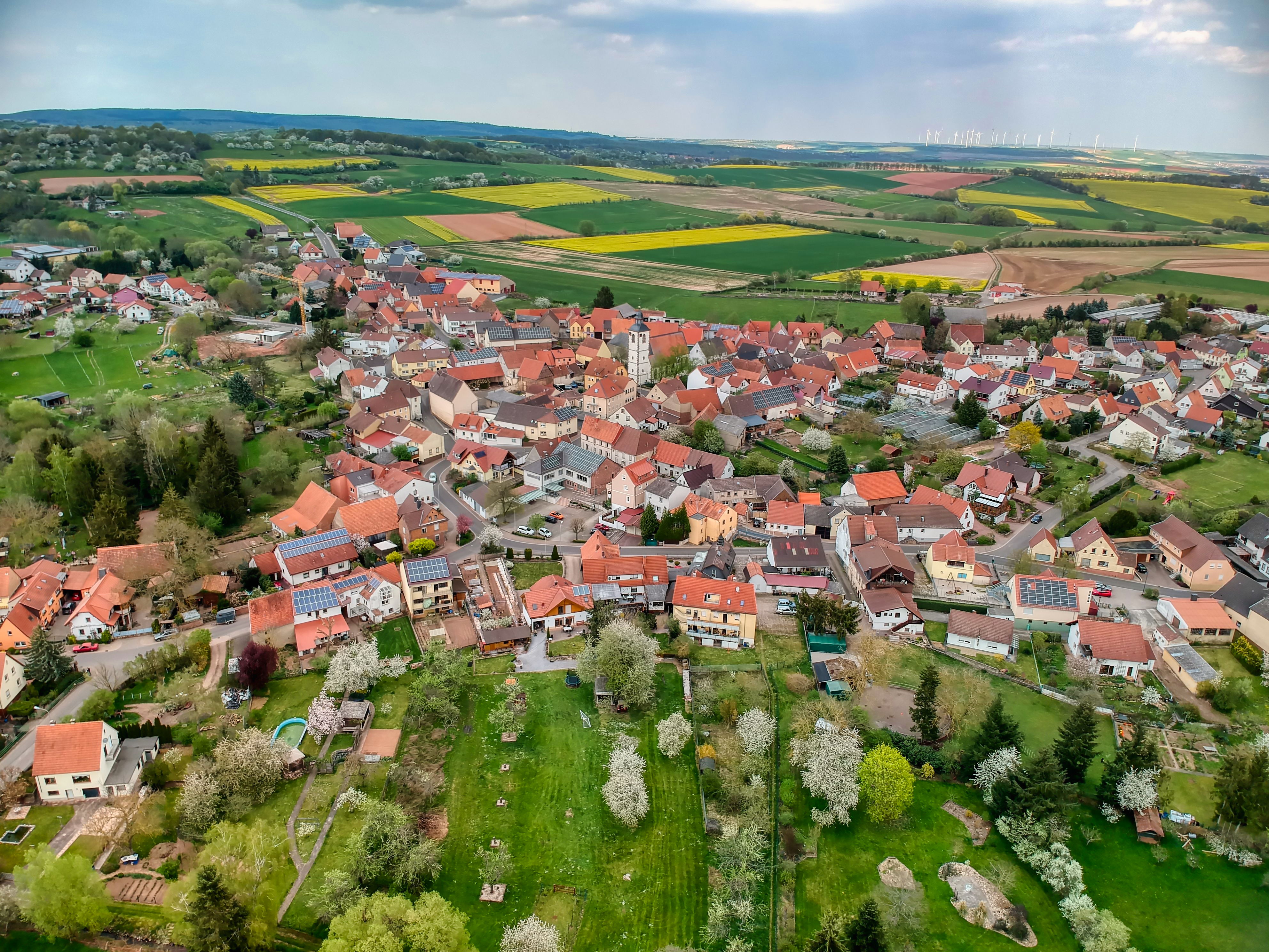 Blick auf Steinbach unterhalb der PVV-Hütte aus ca. 100m Höhe